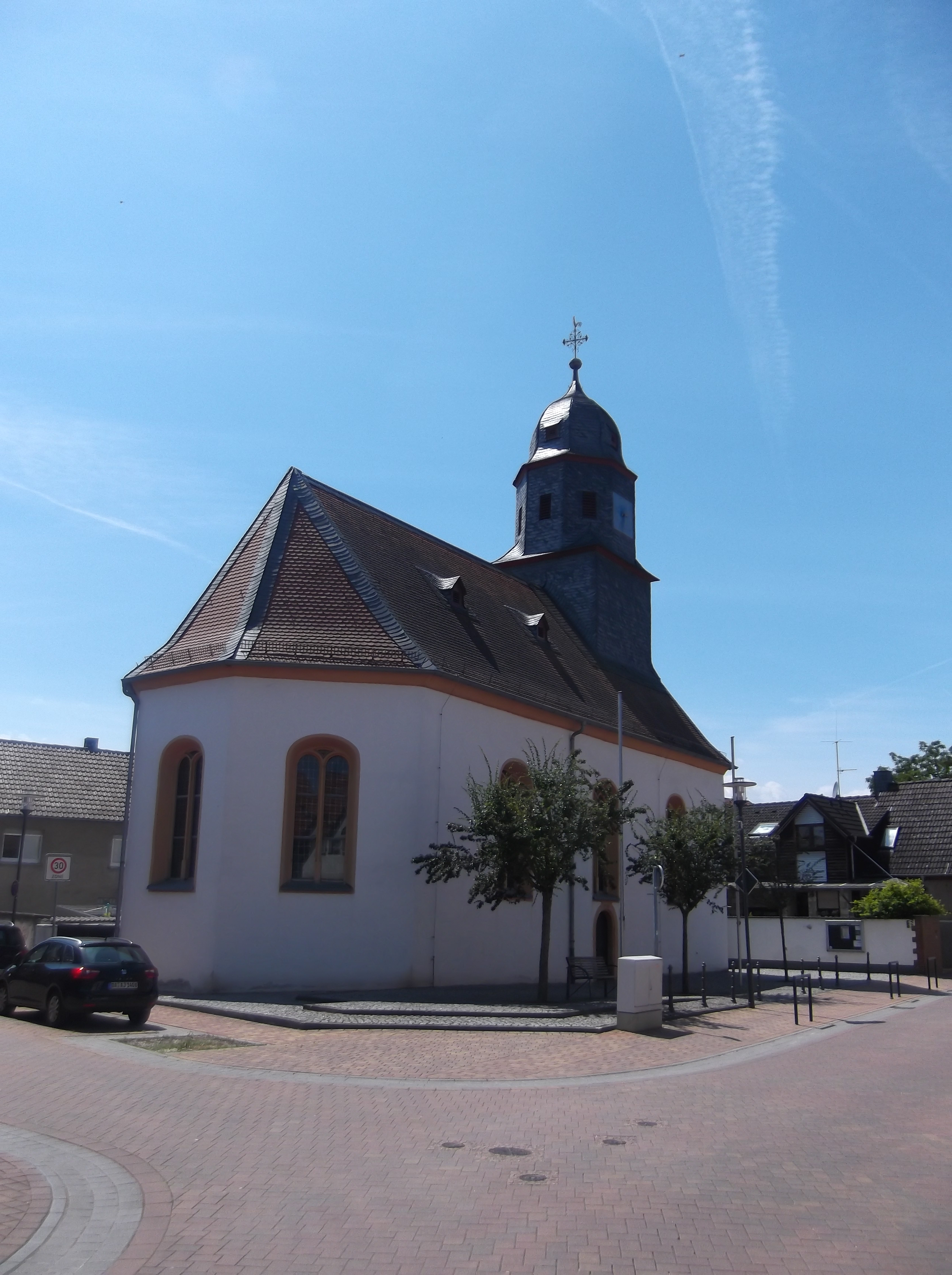 Evvangelische Kirche Hahn